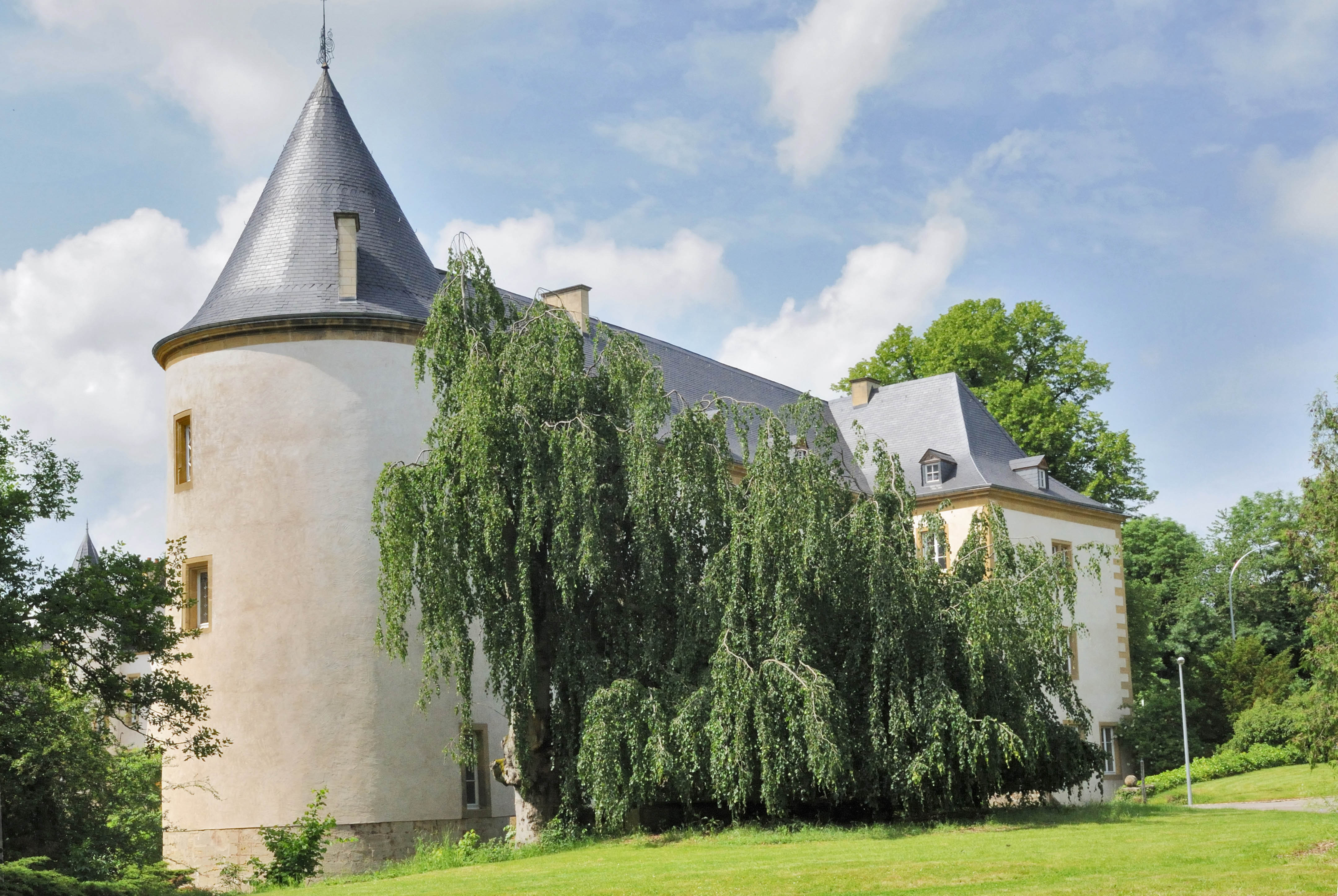 Trauerbuch zu Suessem.